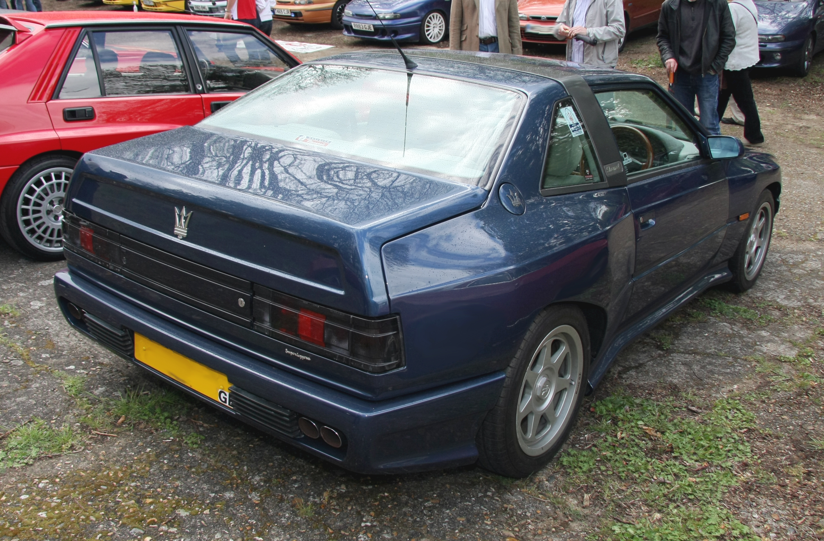 1994 Maserati Shamal at Auto Italia Italian Car Day, Brooklands, May 2010